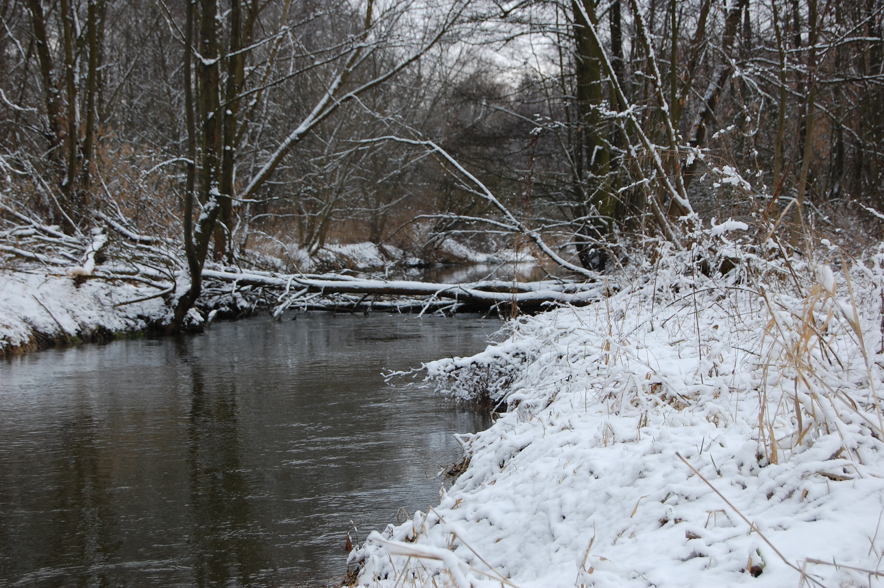 rzeczka Lubienka we wsi Potok